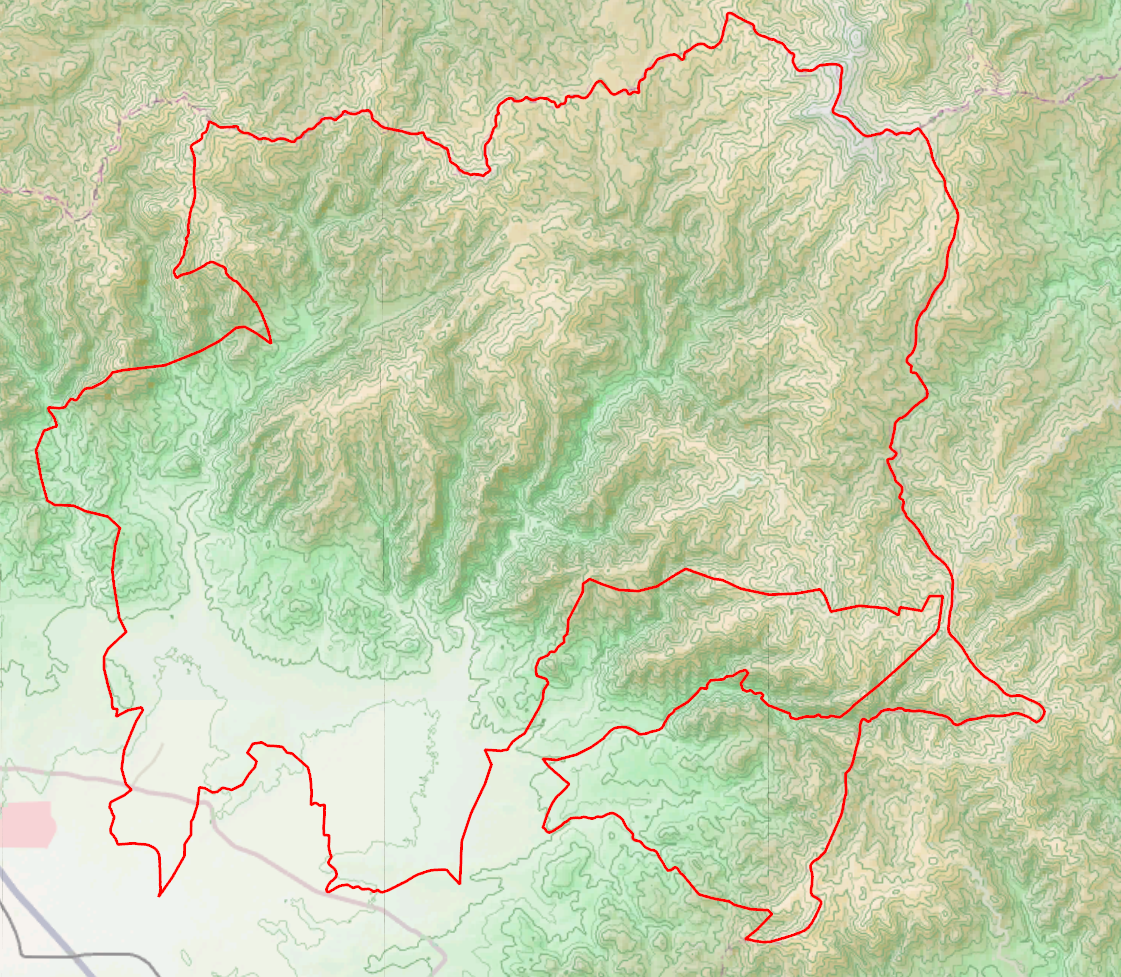 Τοπογραφικός χάρτης του Δήμου Αρριανών